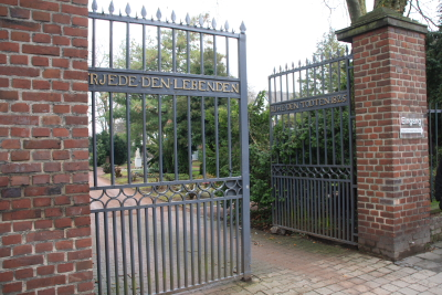 Eingangstor zum evenag. Friedhof in Düren, Kölnstraße